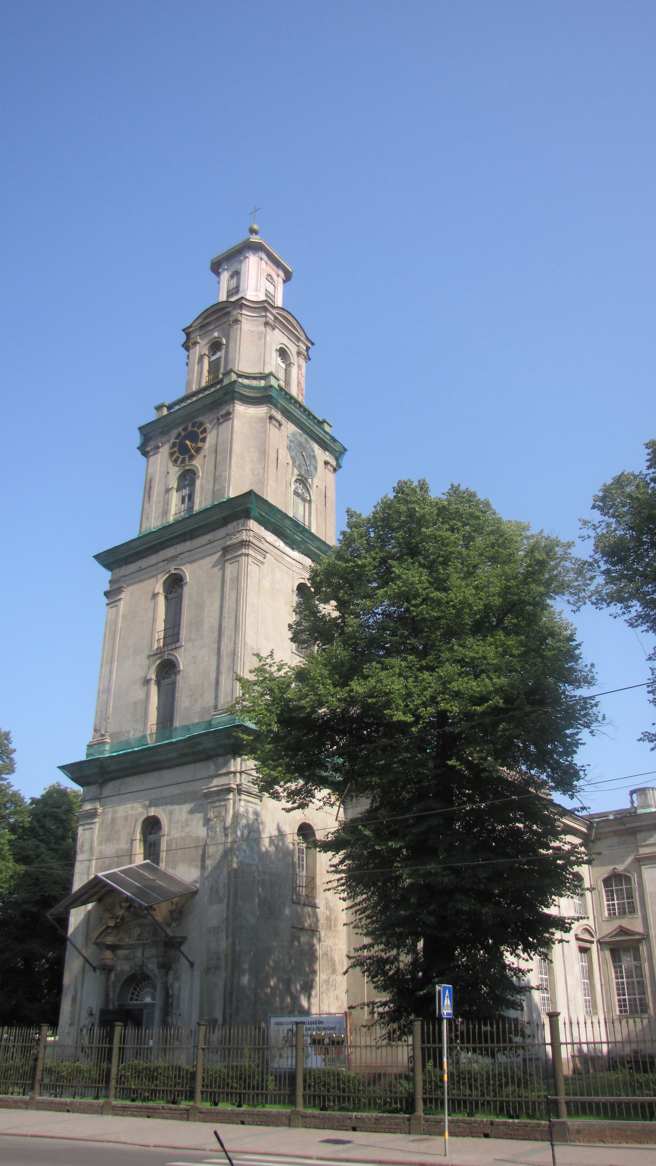 Dreifaltigkeitskirche in Libau